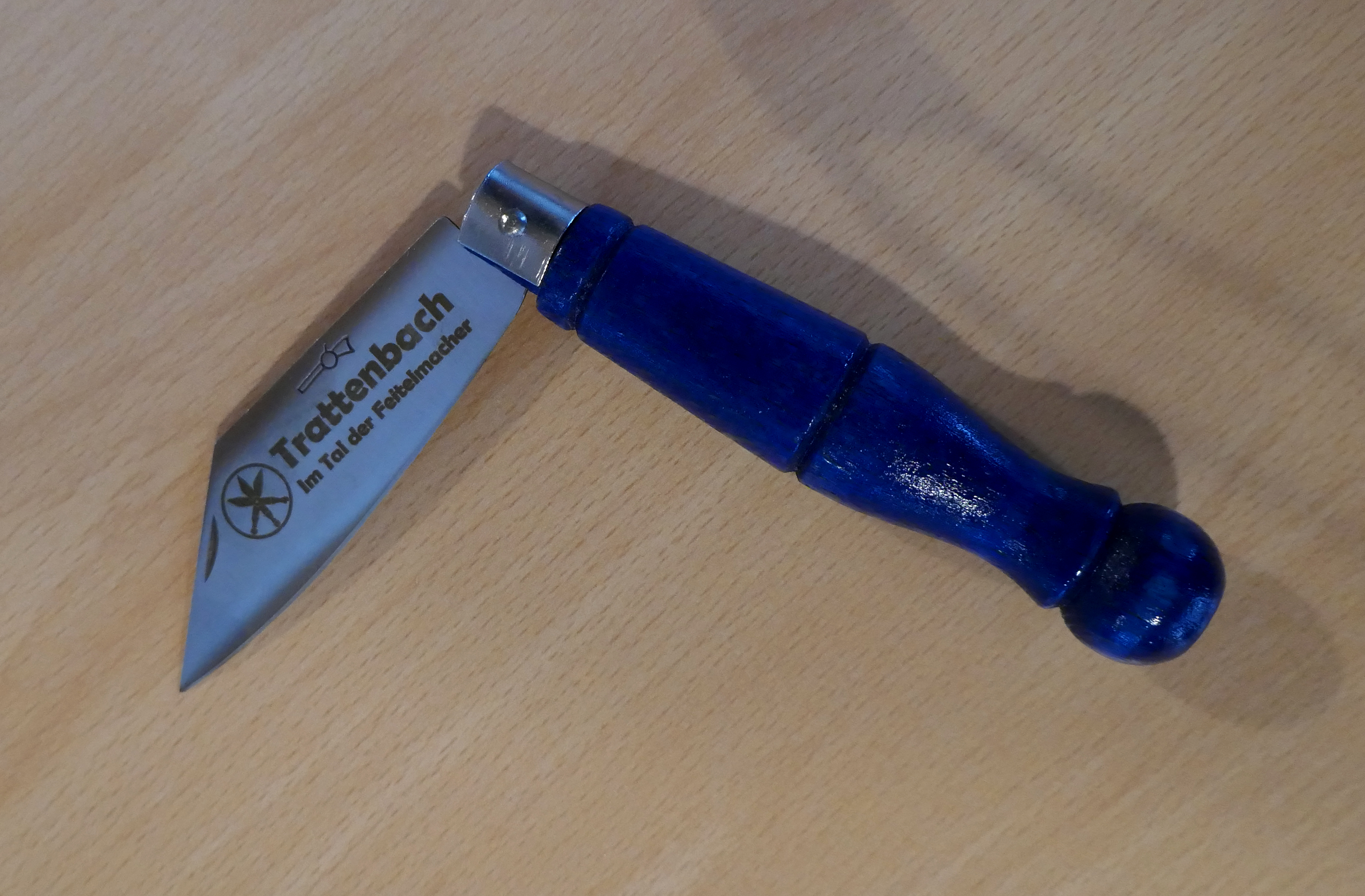 Im Tal der Feitelmacher, Trattenbach - Info Center - Ausstellung.